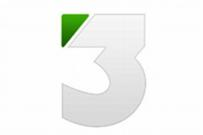 Logo kanálu Jednotka (2004-2012).